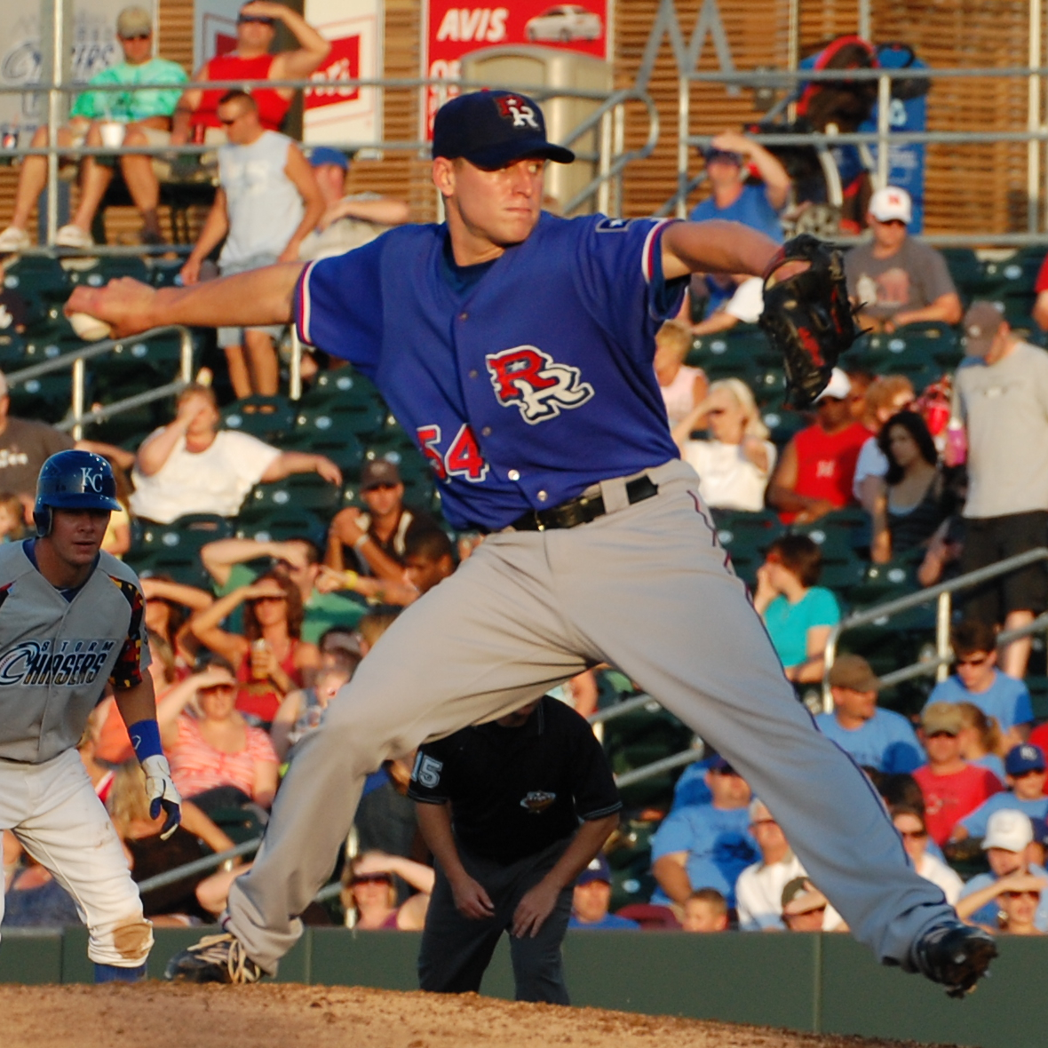 Neil Ramirez